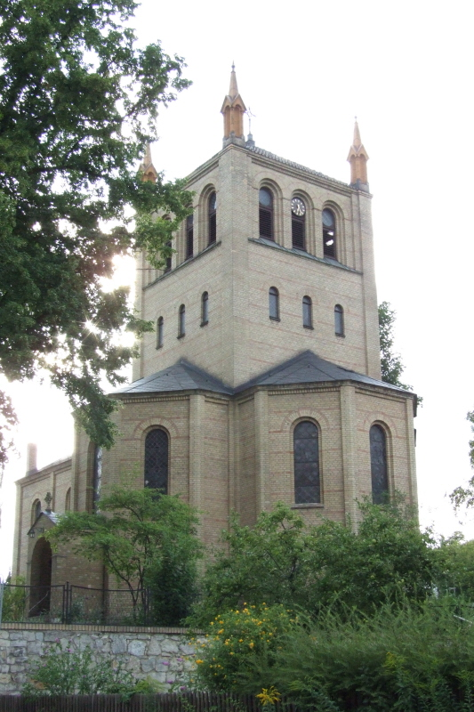 Dorfkirche Stolpe in Berlin-Wannsee Fotograf: Harald Rossa Datum: August 2006 Höher aufgelöste Version ist verfügbar Church Stolpe in Berlin-Wannsee Fotograf: Harald Rossa Date: August 2006 Version with higher resolution is available